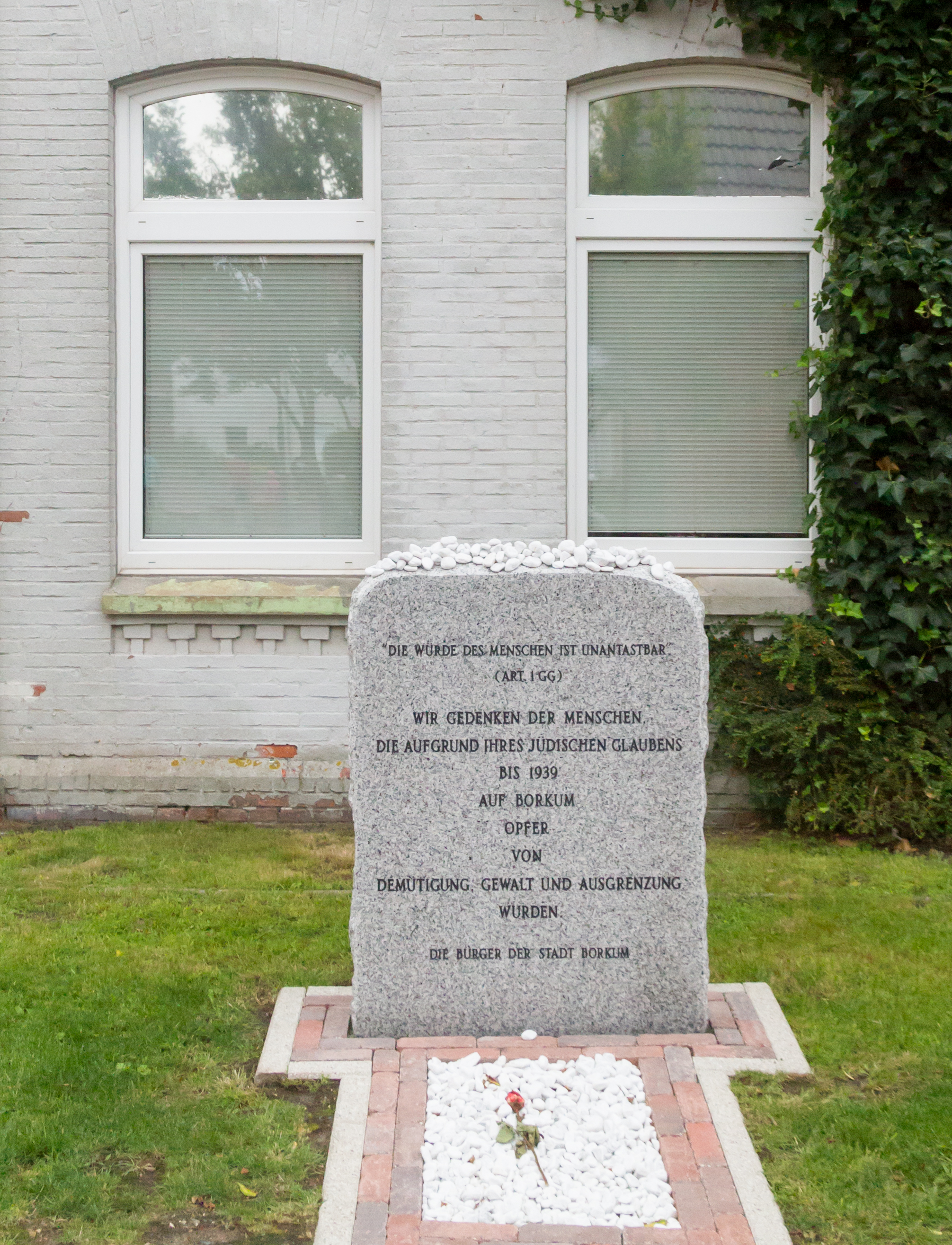 Gedenkstein für verfolgte jüdische Gäste